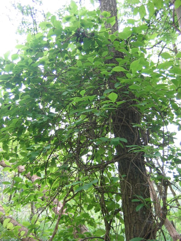 Wald-Geißblatt Lonicera periclymenum, Müritz-Gebiet